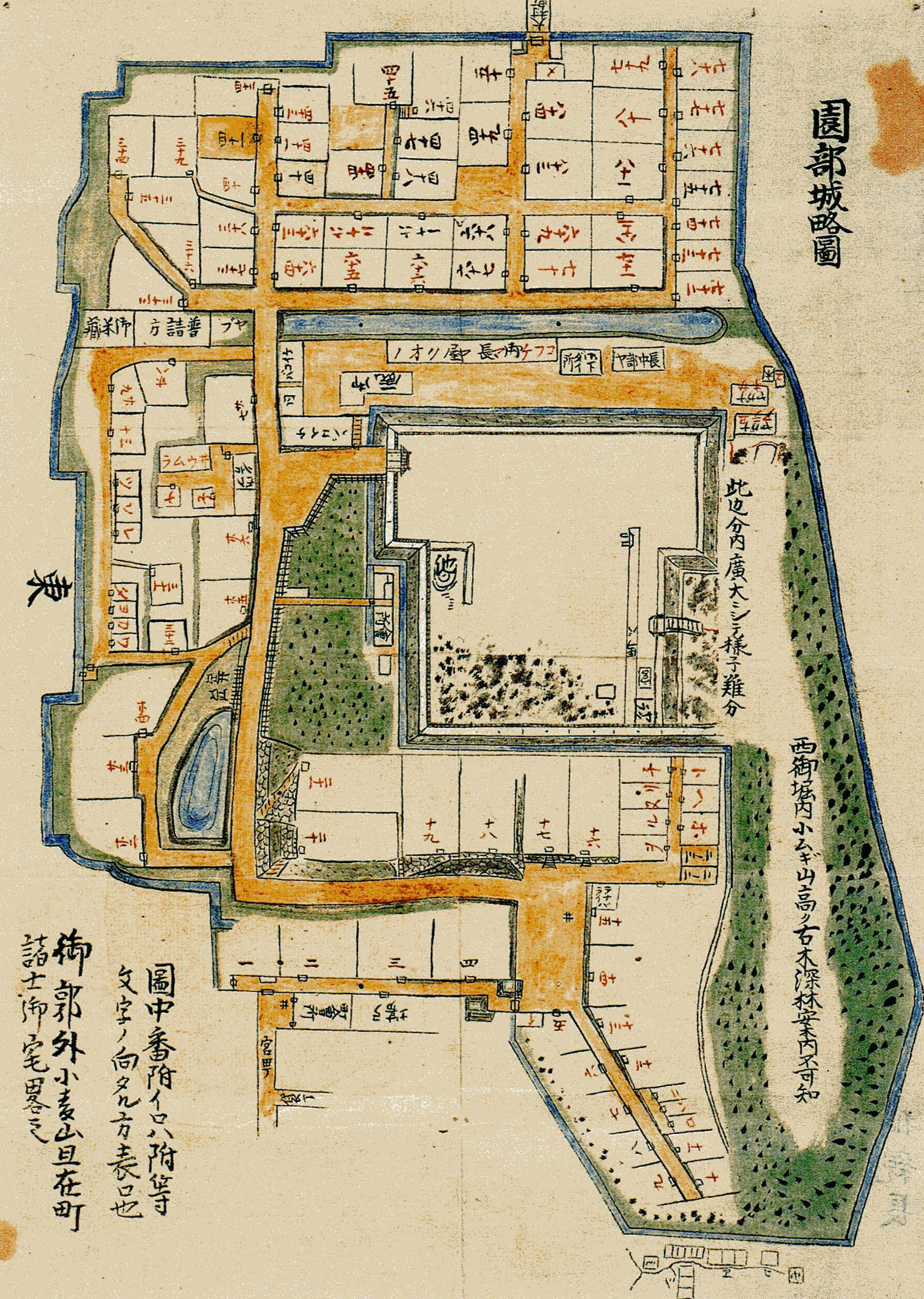 園部城略図